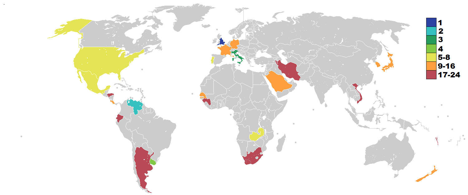 Teilnehmer und deren Abschneiden bei der U-20-Fußball-Weltmeisterschaft 2017 in Südkorea